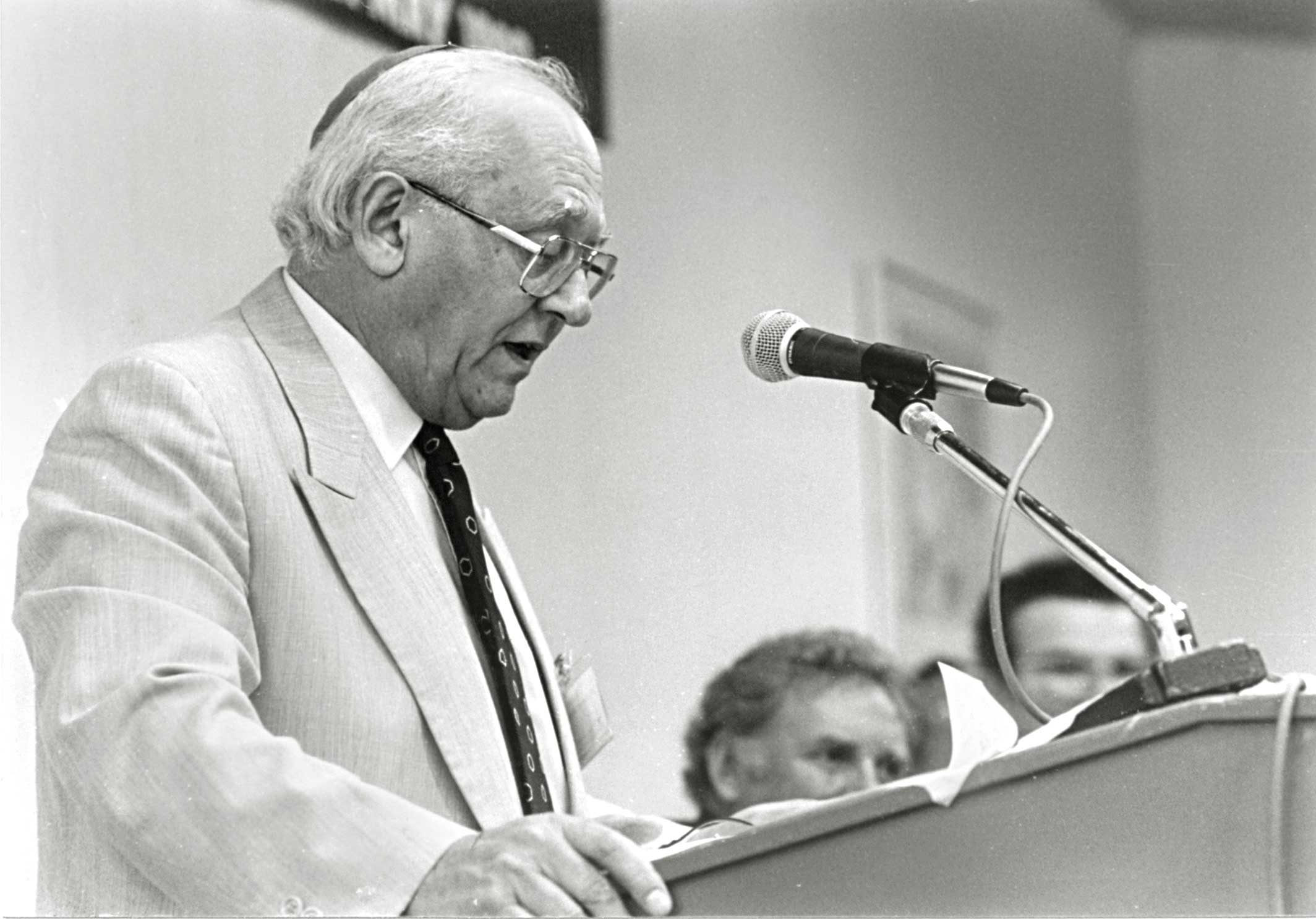 Justice Menachem Elon